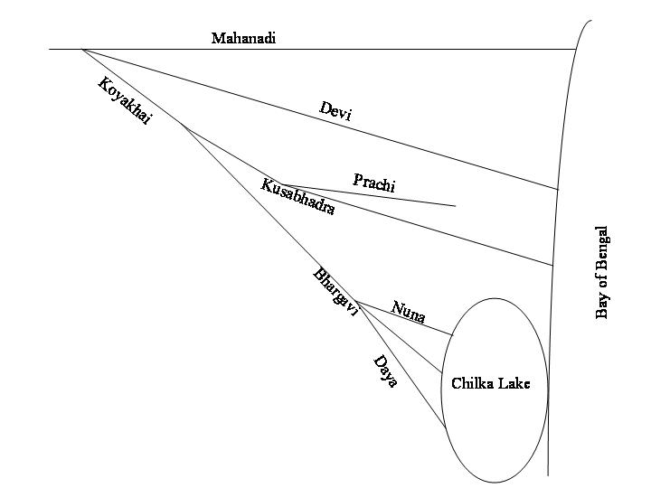 Mahanadi Koyakhai distributary system